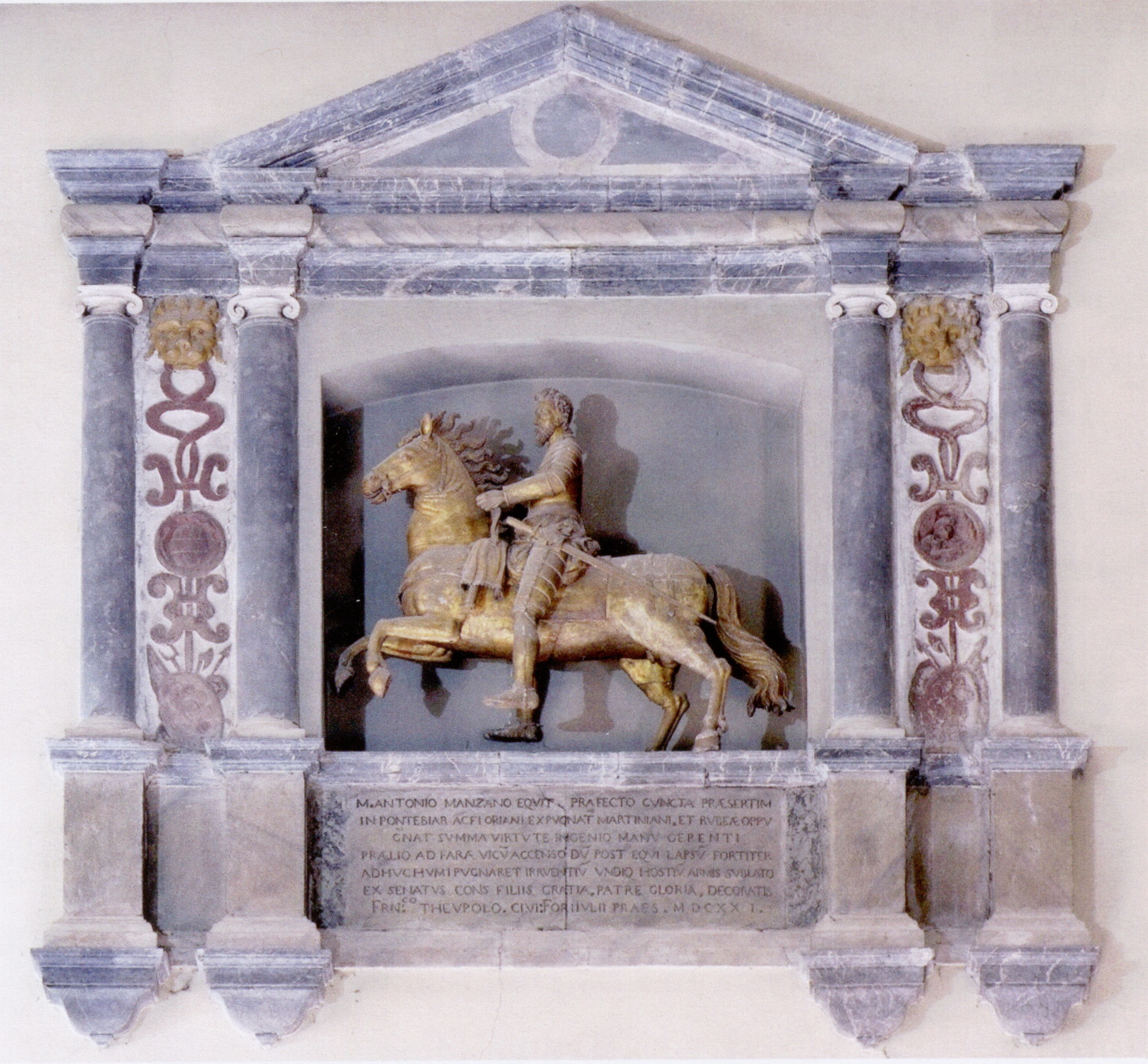 Duomo di Cividale - Monumento a Marcantonio da Manzano